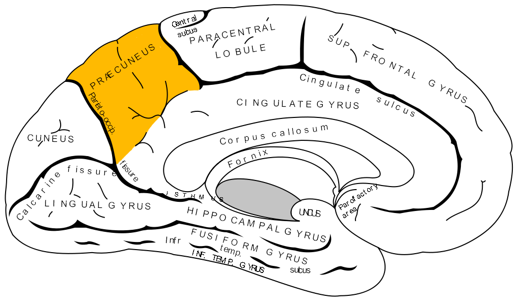 Precuneus.